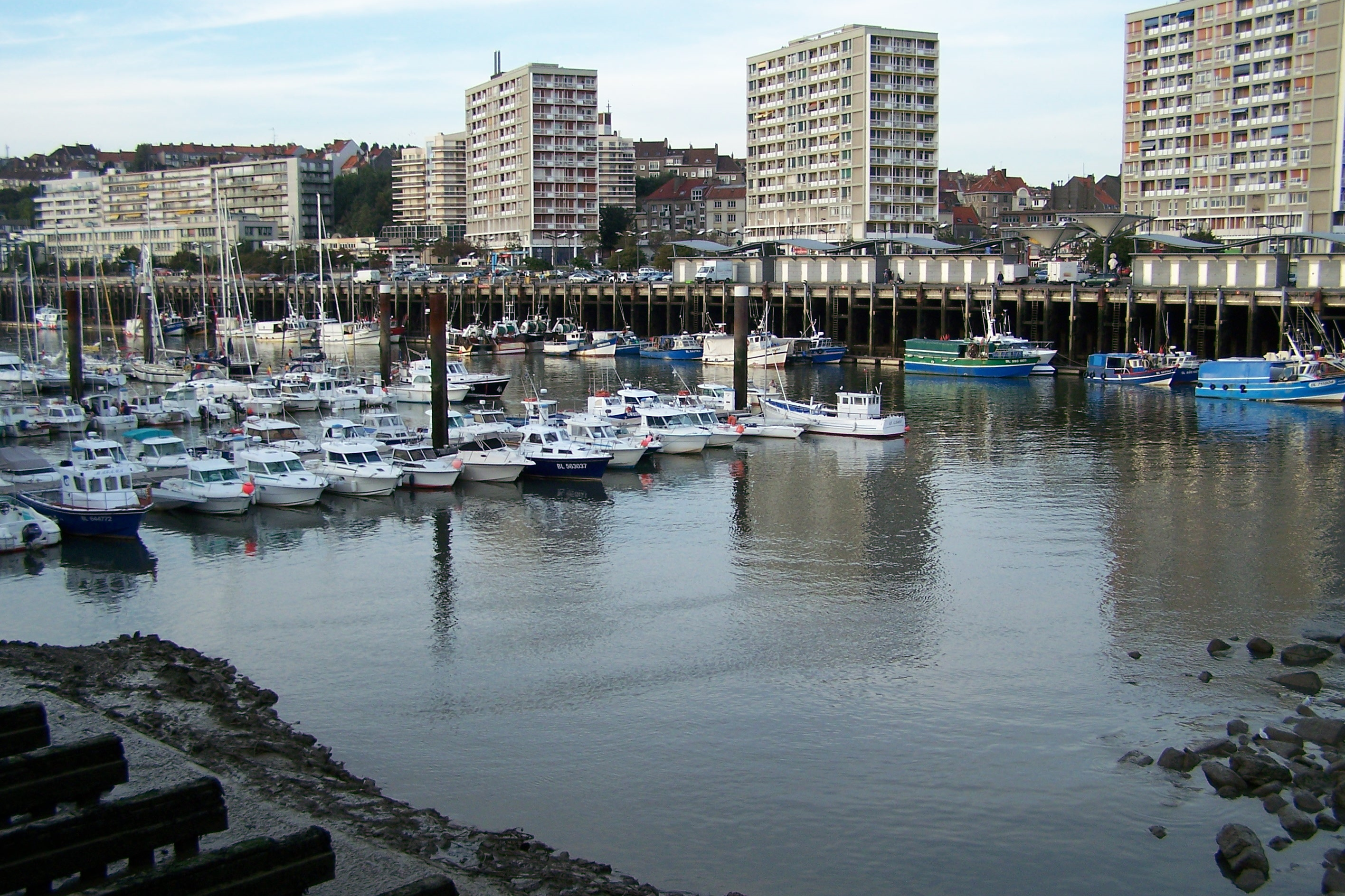 Boulogne, Low tide